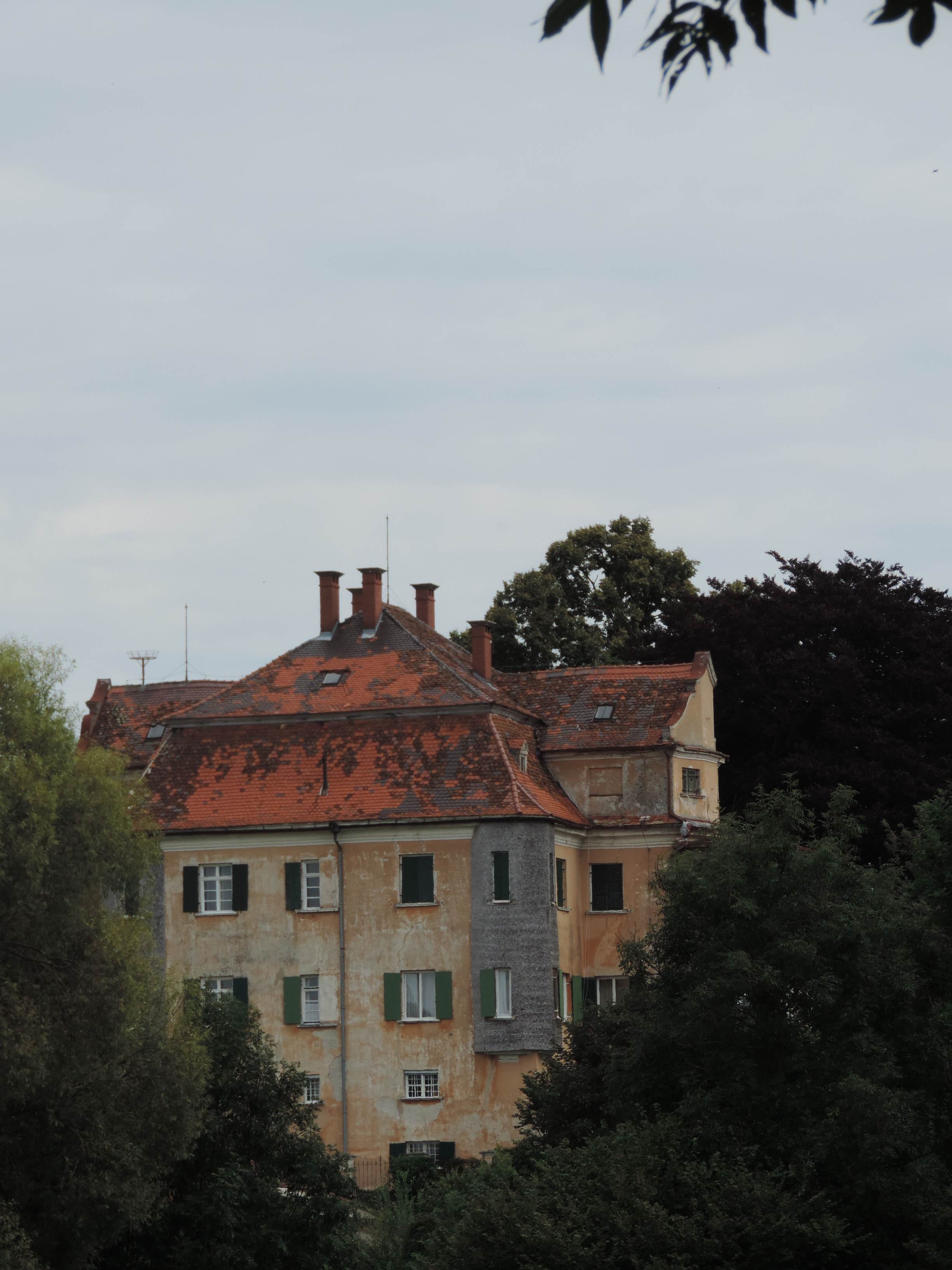 Rückseite Schloss Burtenbach